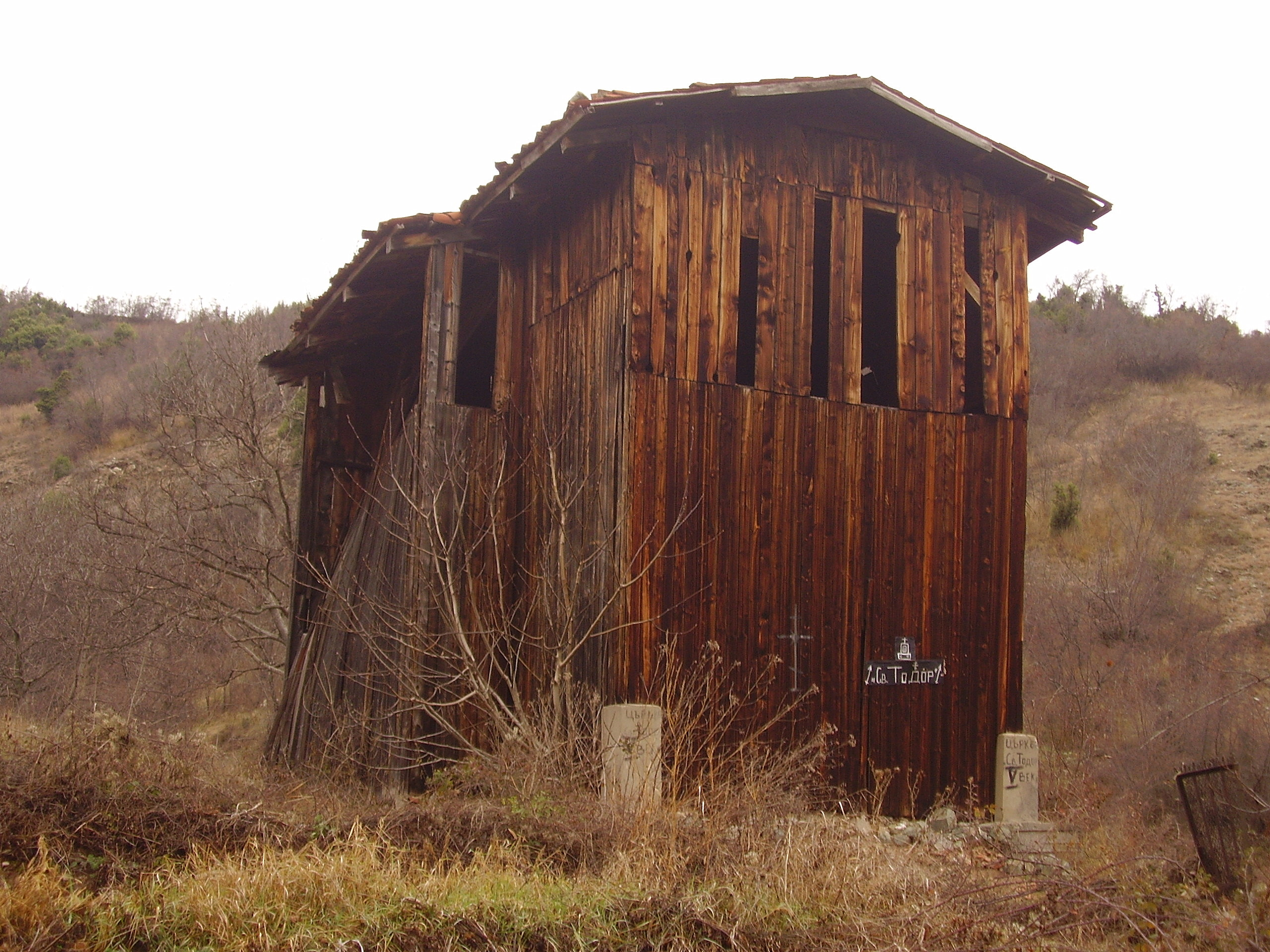 Опаковъчната барака в която се помещава средновековната църква "Св.Тодор" - Бобошево